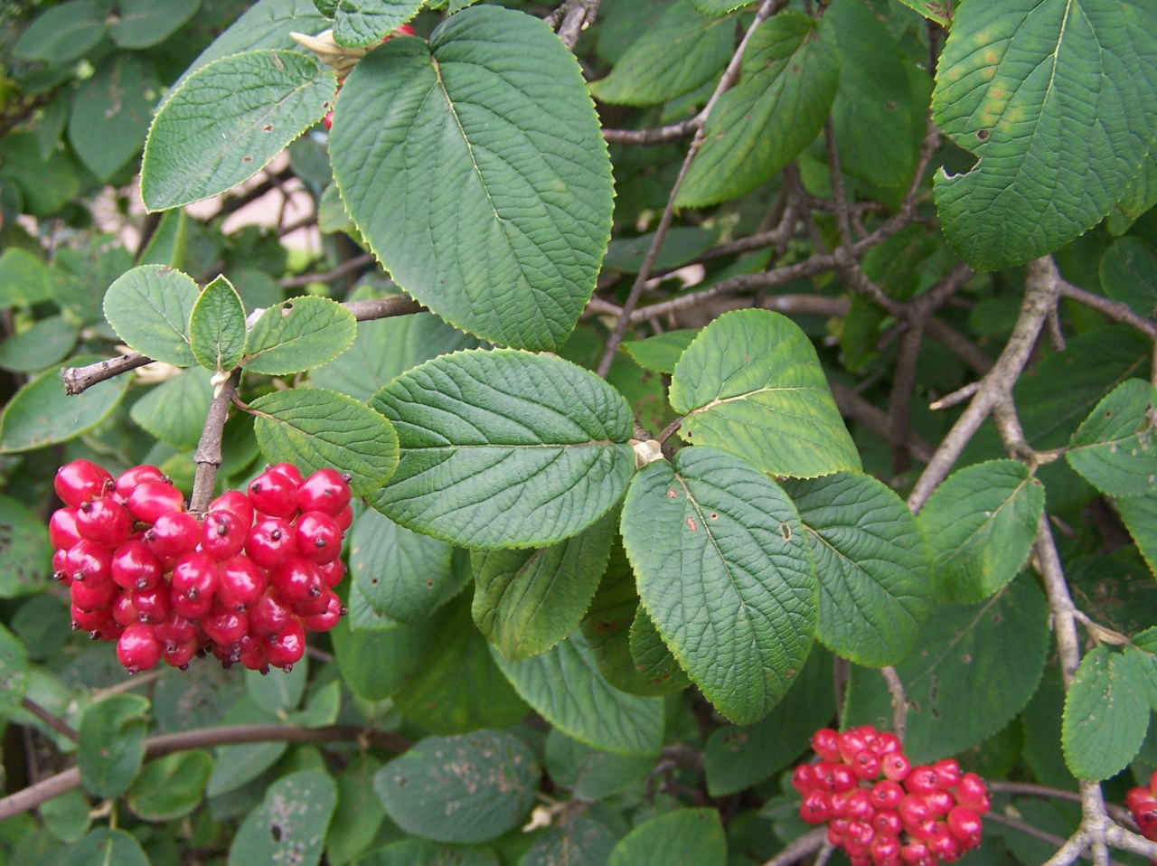 Viburnum lantana (pl. kalina hordowina)